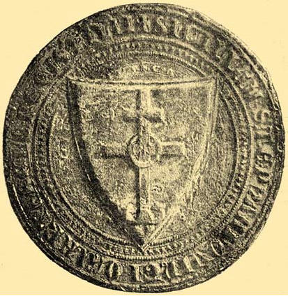 Pečeť Štěpána V.